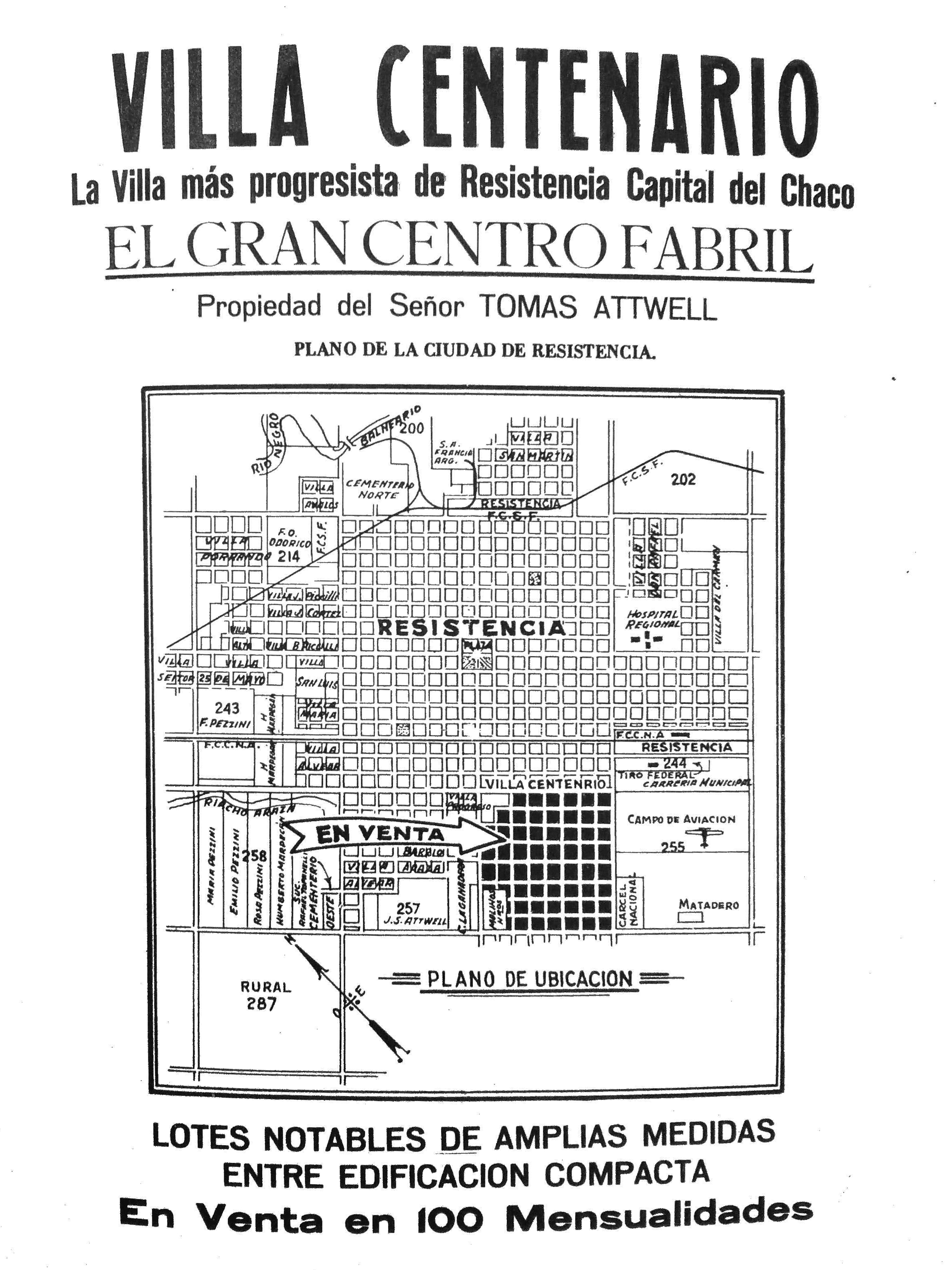 Loteo de Thomas Attwell en Villa Centenario